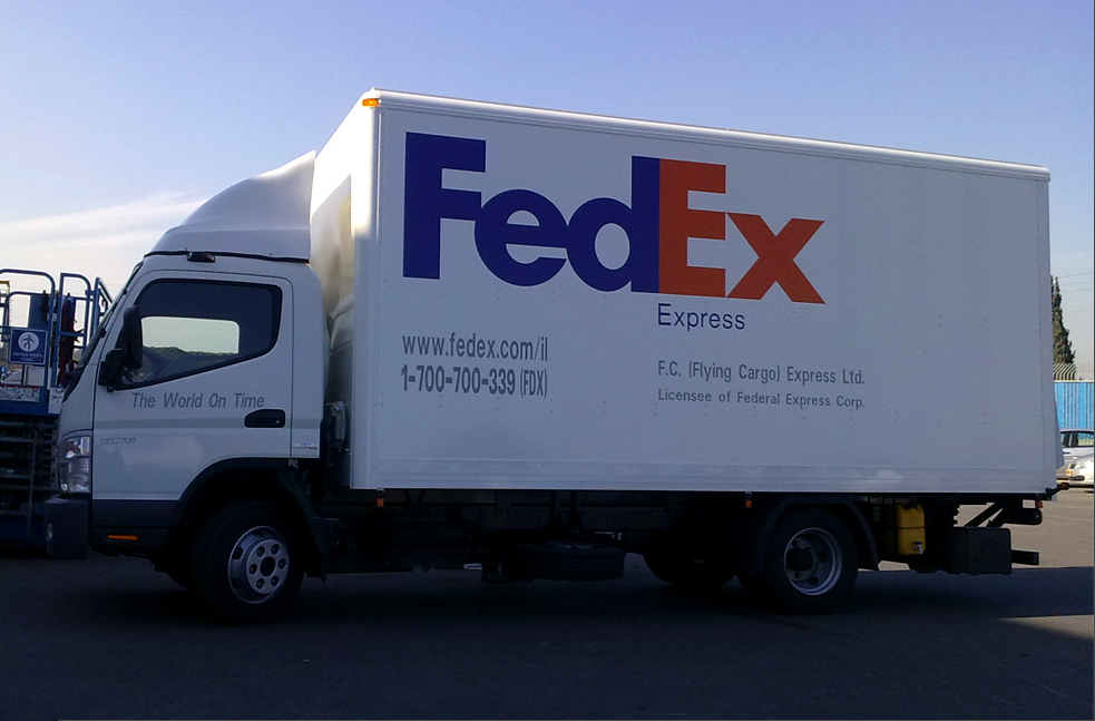 משאית זעירה פד-אקס ישראל FEDEX ISRAEL